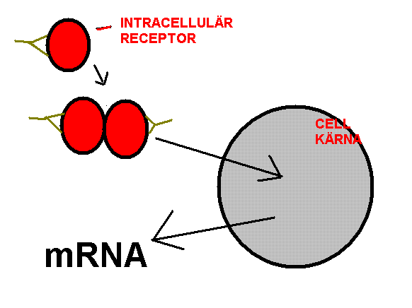 intracellulär receptorverkan